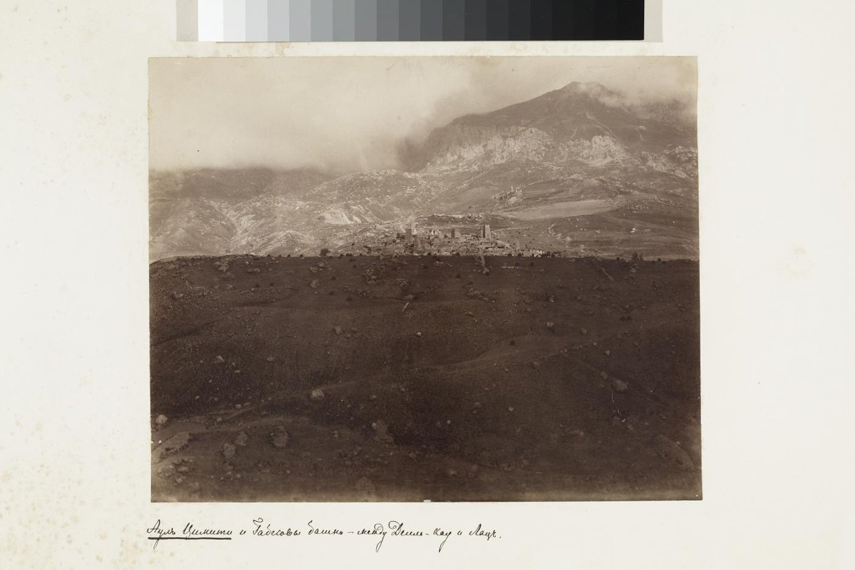 Аул Цимити в Куртатинском ущелье